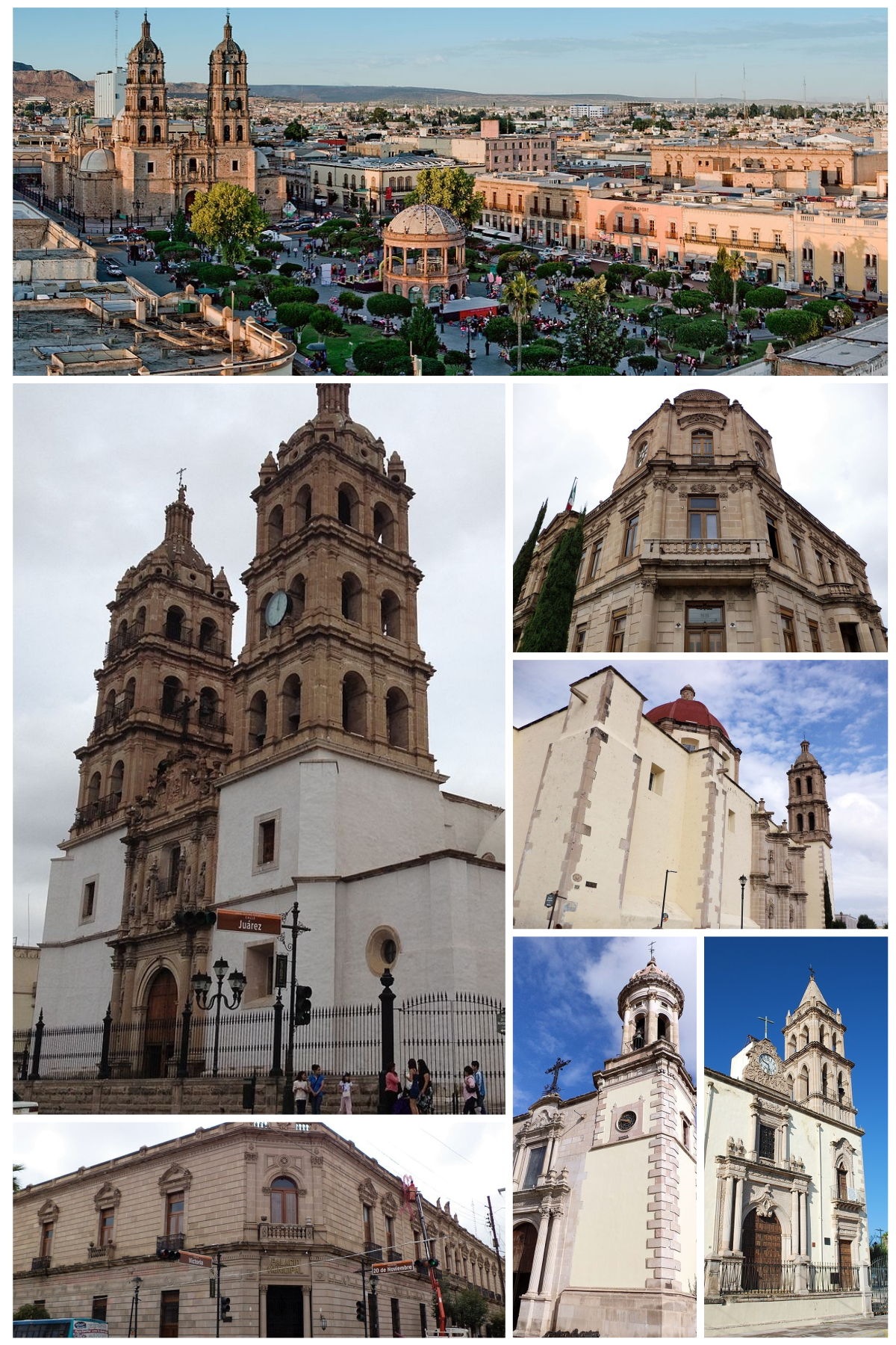 Victoria de Durango